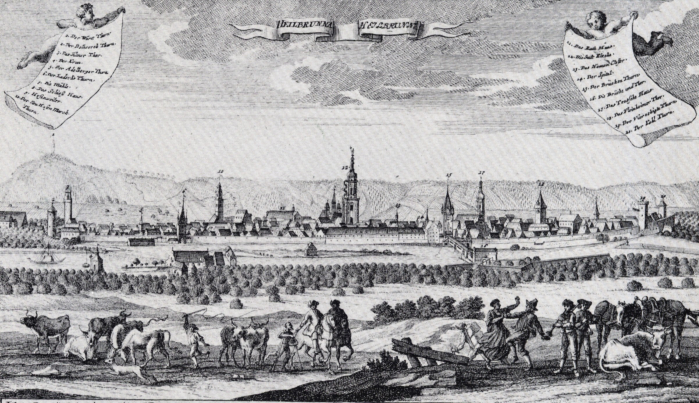 Heilbronn von Westen